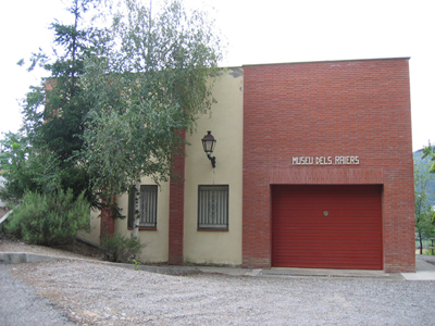 Museu de Raiers a la Pobla de Segur. Any 2006.